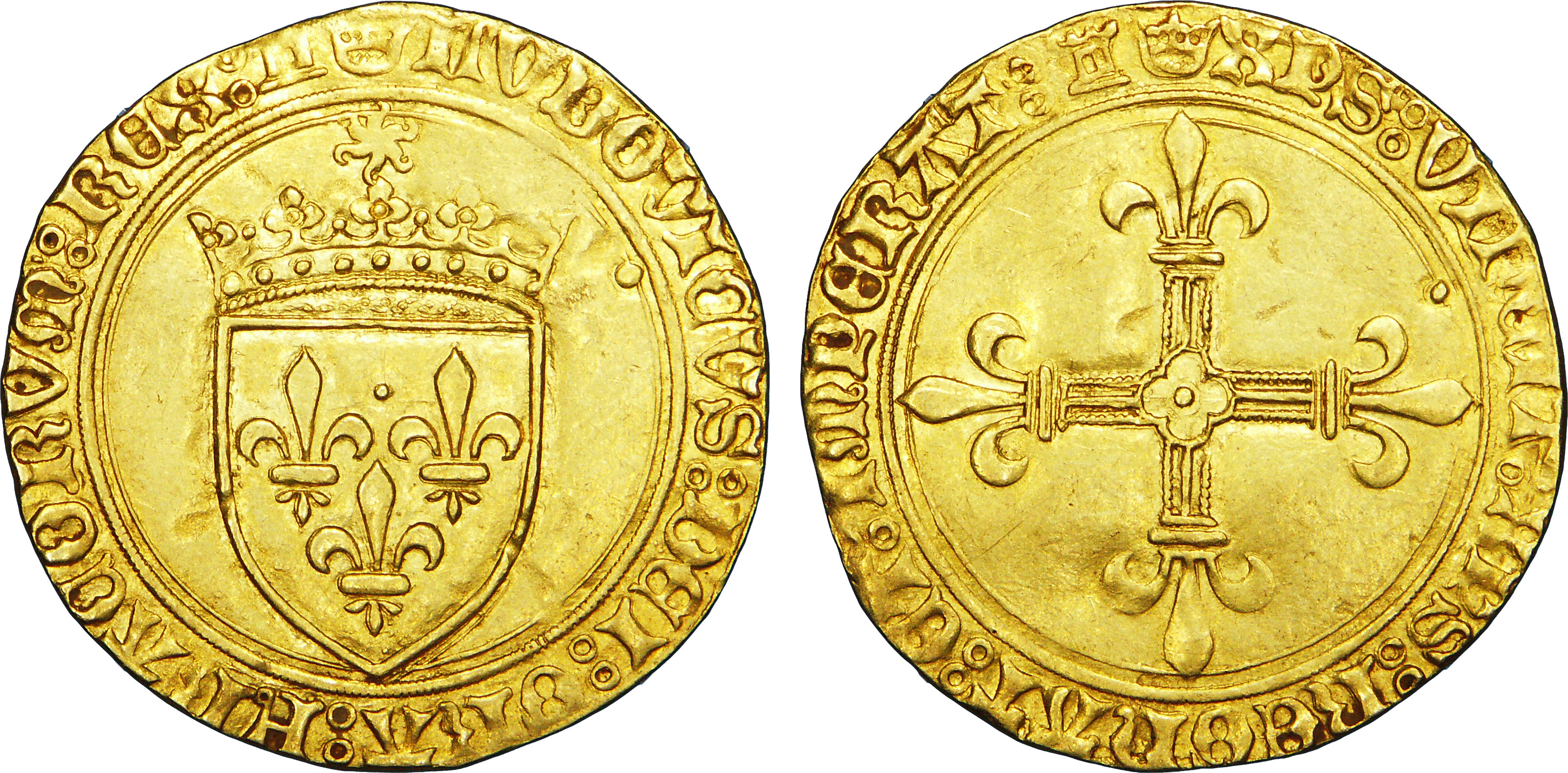 Nom de l'atelier/ville : Tours Métal : or Diamètre : 26mm Axe des coins : 4h. Poids : 3,35g. Titulature avers : (couronne) LVDOVICVS: DEI: GRA: FRACORVm: REX: (tour), (ponctuation par deux annelets superposés). Description avers : Écu de France couronné sommé d'un soleil. Traduction avers : (Louis, par la grâce de Dieu, roi des Francs). Titulature revers : (couronne) XPS: VInCIT: XPS: REGnAT: ET: ImPERAT: (tour), (ponctuation par deux annelets superposés). Description revers : Croix fleurdelisée avec quadrilobe en cœur. Traduction revers : (Le Christ vainc, le Christ règne, le Christ commande). Fabrication: 2 November 1475